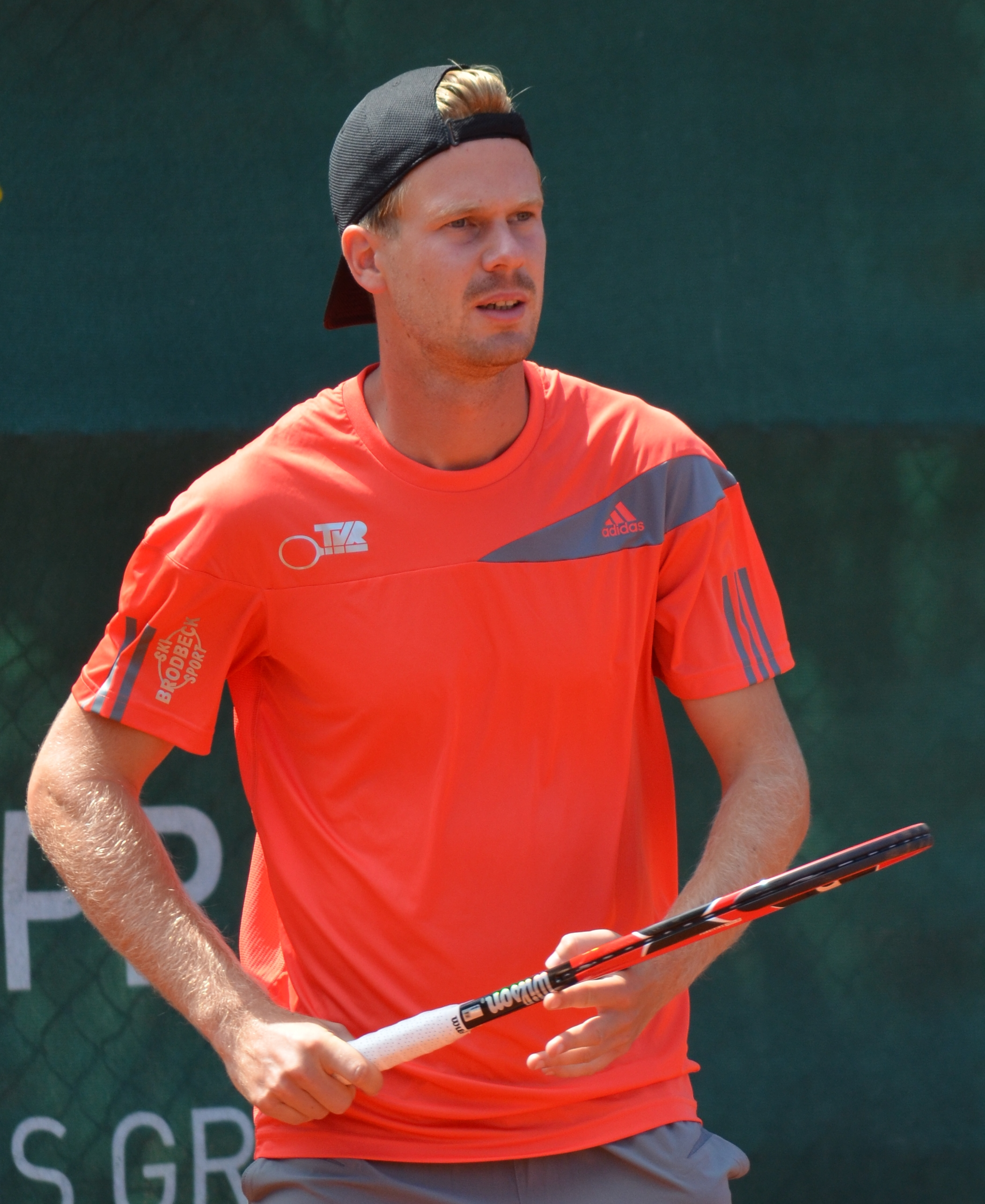 Nils Langer beim Spiel der 2. Tennis-Bundesliga der Herren am 2. August 2015 SC Uttenreuth gegen TV Reutlingen